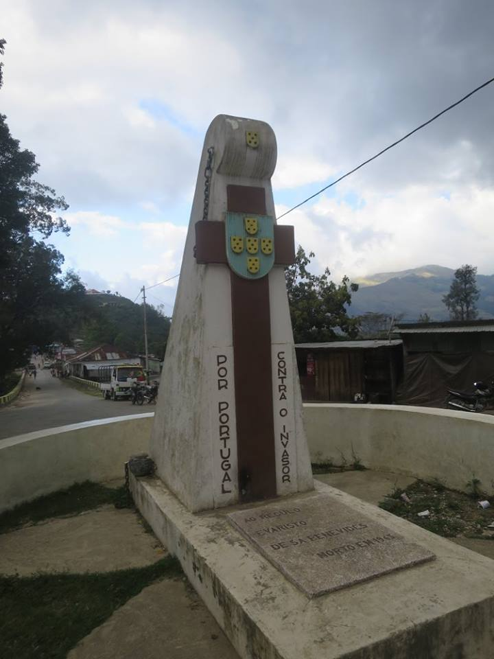 Memorial Reulo Evaristo de Sá Benevides, Maubisse